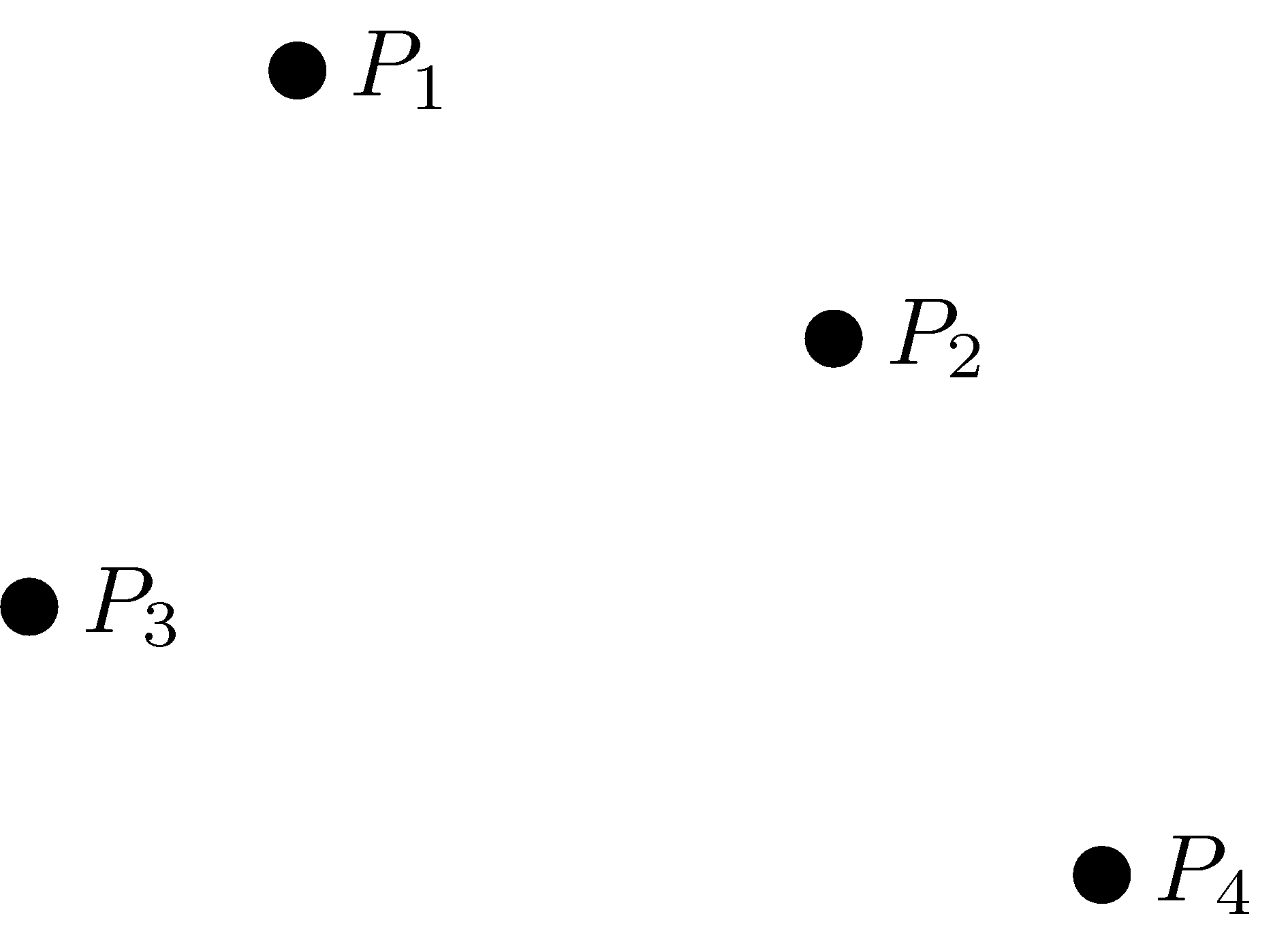 Punkte